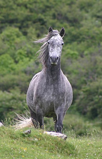 Eine Connemara-Pony Stute.